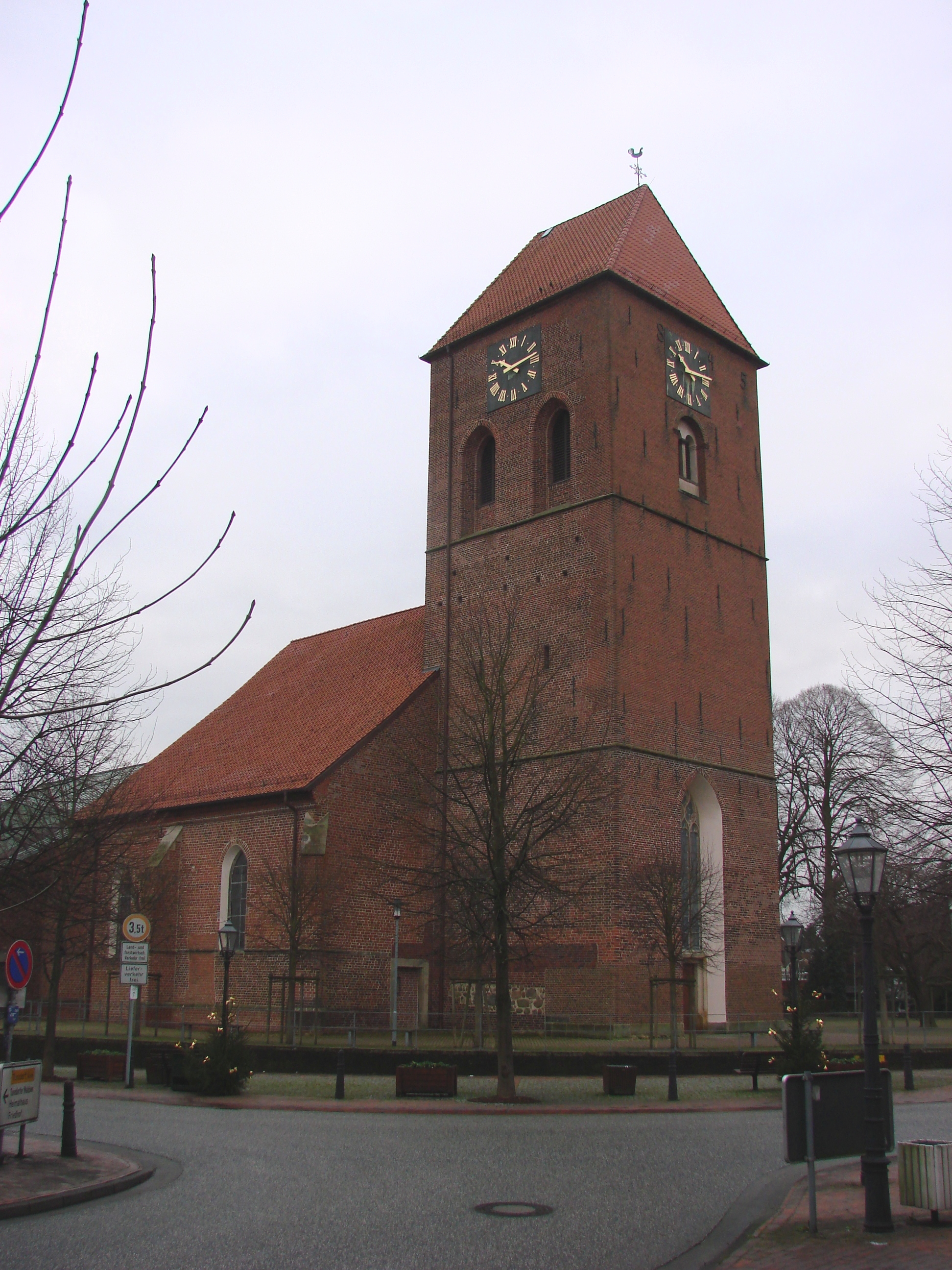 Church St. Amandus in Aschendorf/Ems